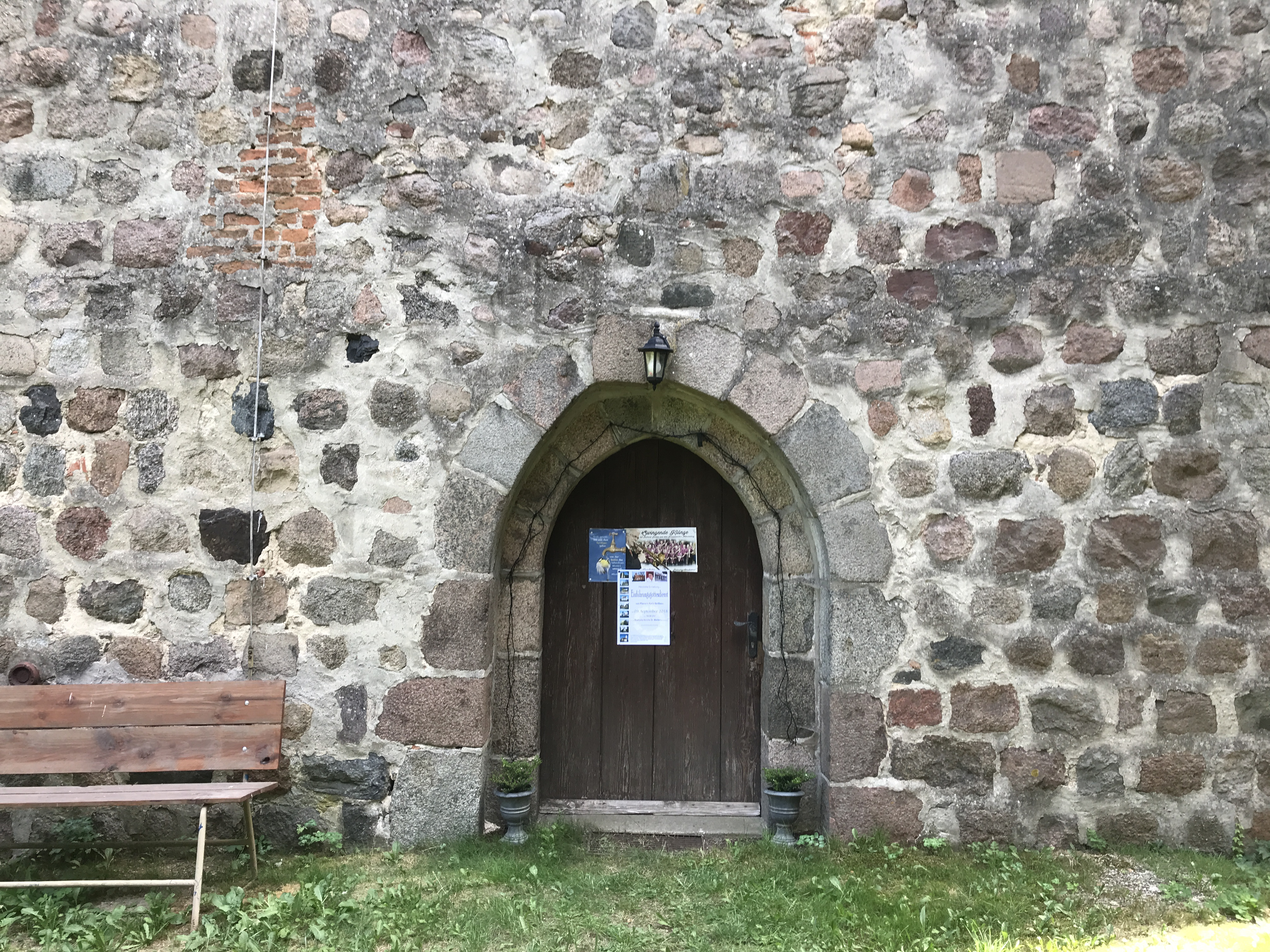 Die Dorfkirche Schönfelde der Gemeinde Steinhöfel ist eine Feldsteinkirche aus dem 13. Jahrhundert. In ihrem Innern steht unter anderem ein Kanzelaltar aus dem 18. Jahrhundert.